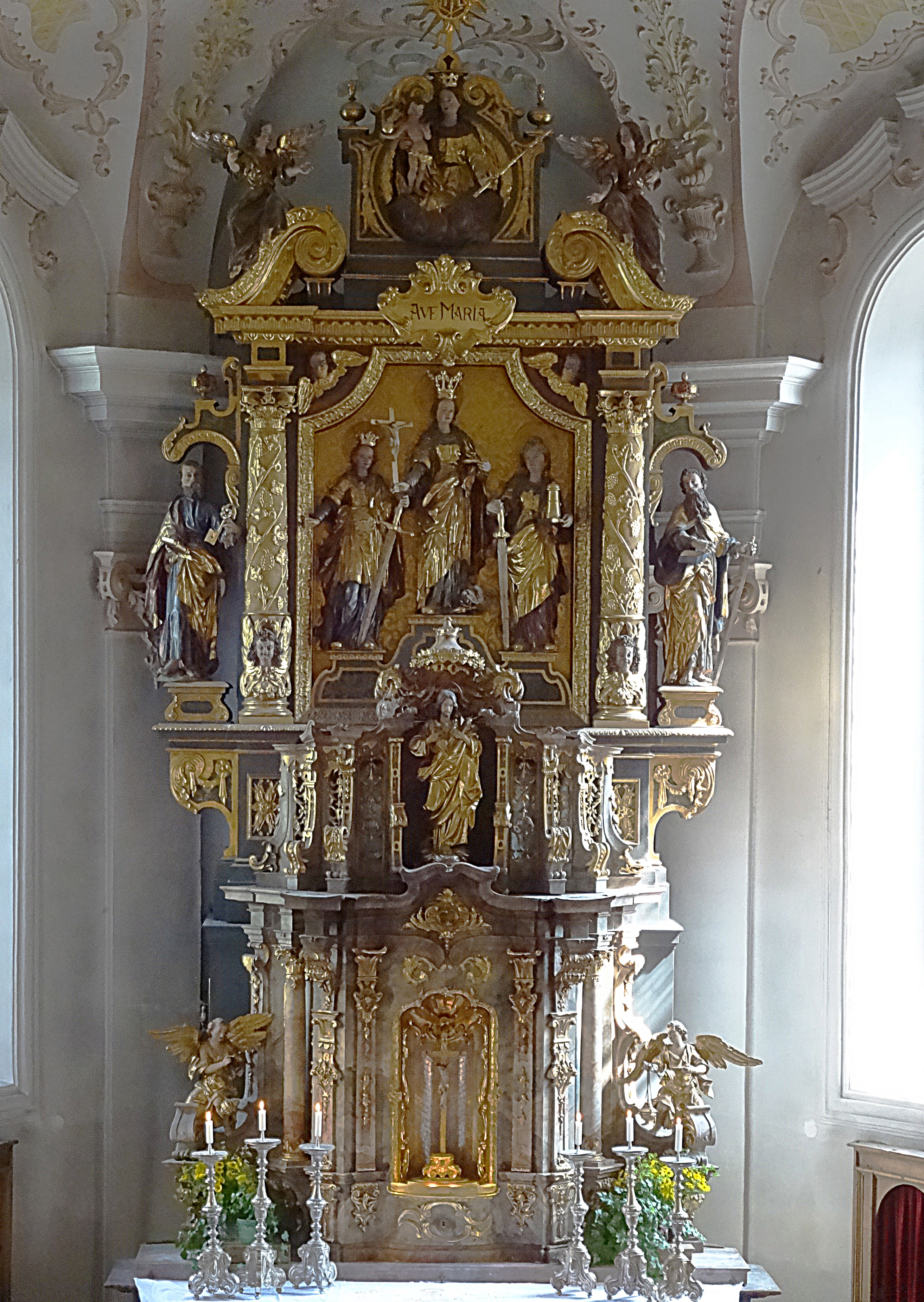 Hochaltar aus dem 17. Jahrhundert in St. Margareth Bayrischzell